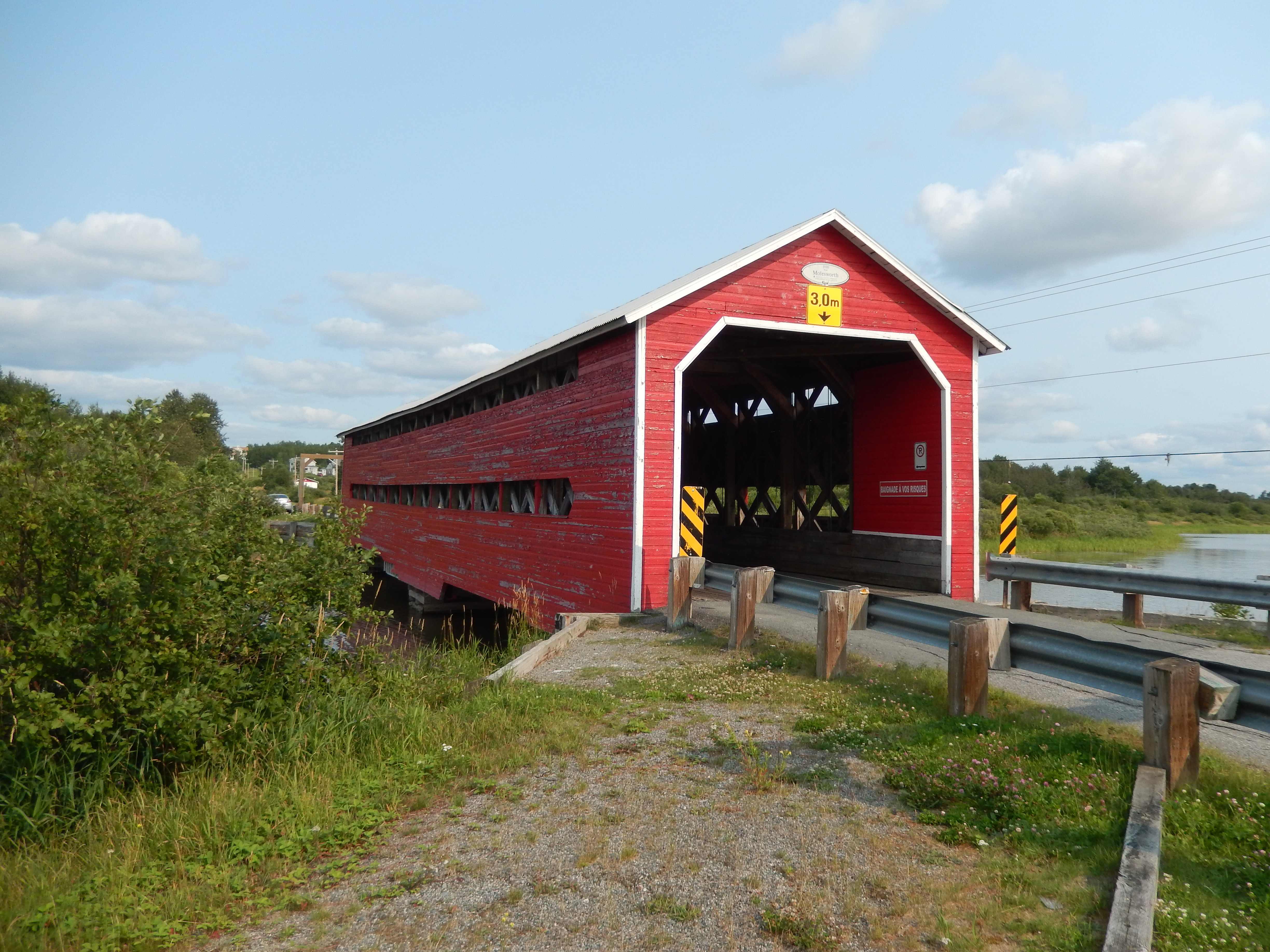 Le pont Molesworth sur la rivière Loïs